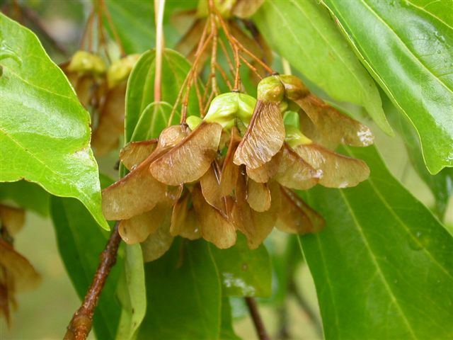 Graines d'érable de burger (ou érable trident) Acer buergerianum seeds